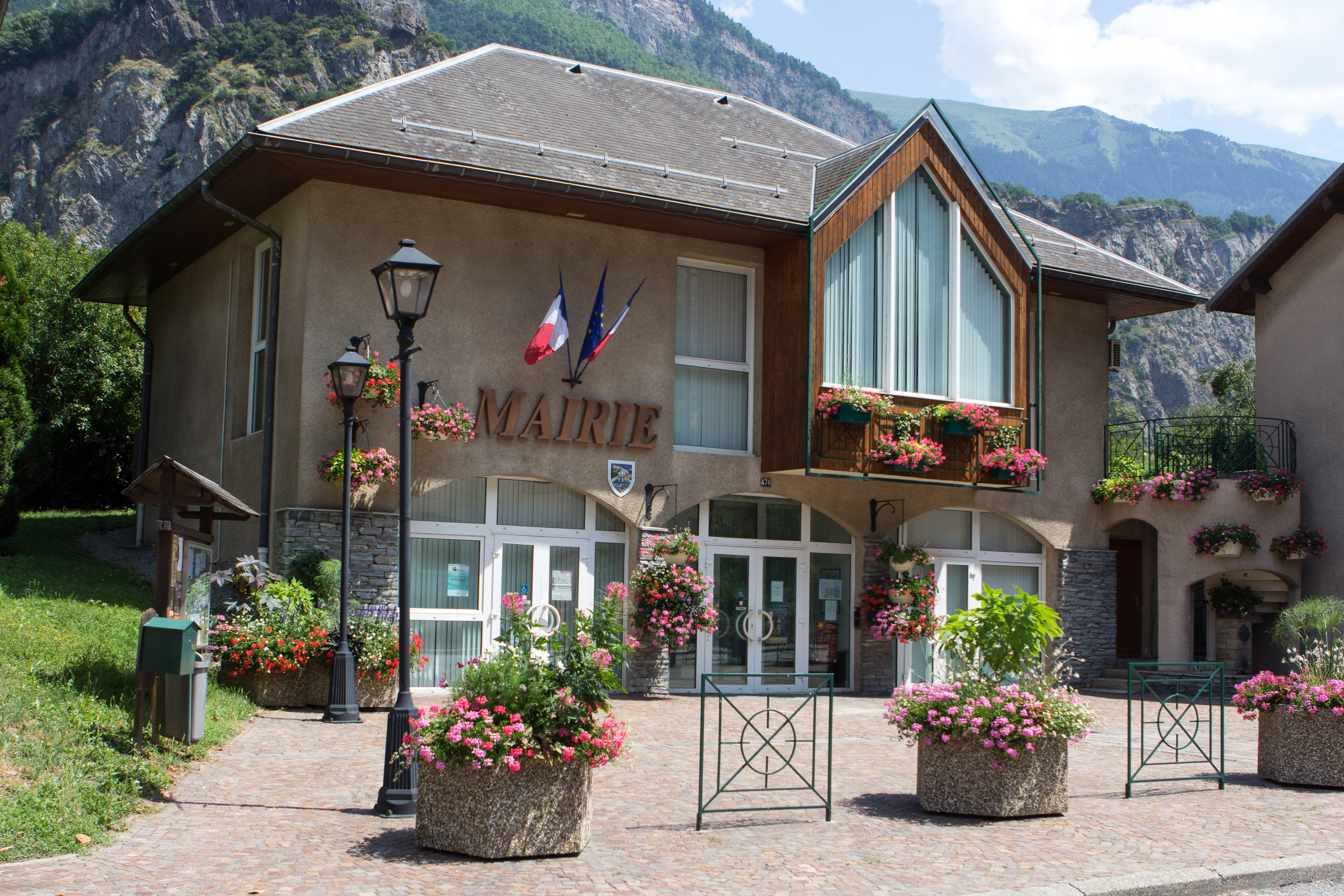 Mairie de Pontamafrey-Montpascal / Pontamafrey-Montpascal / Savoie / France